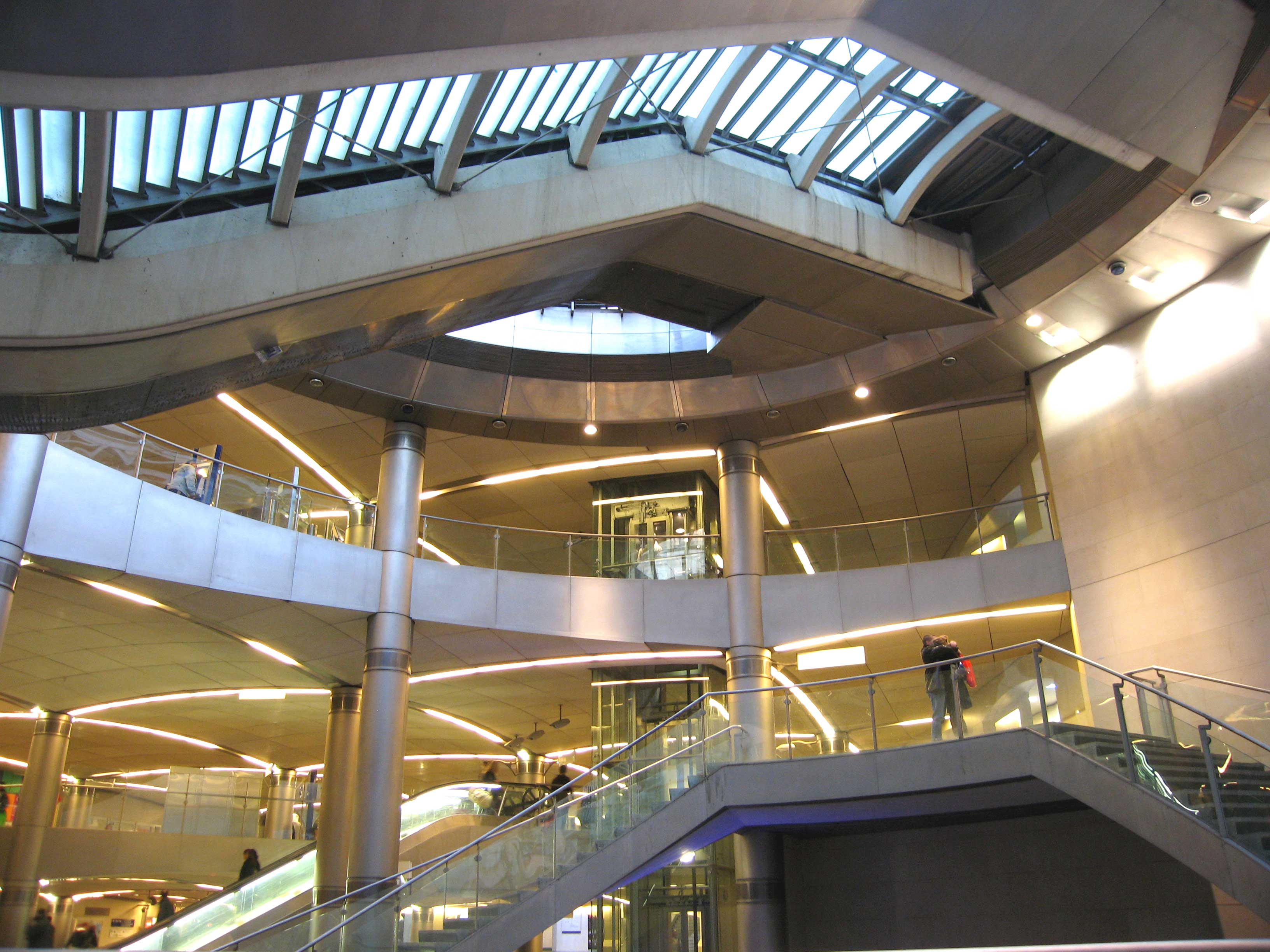 Métro de Paris, Salle d'échanges Saint Lazare, Paris, France